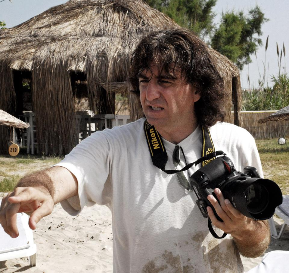 Türkmençe: Niko Guido izni ile yüklenen kişisel portresi